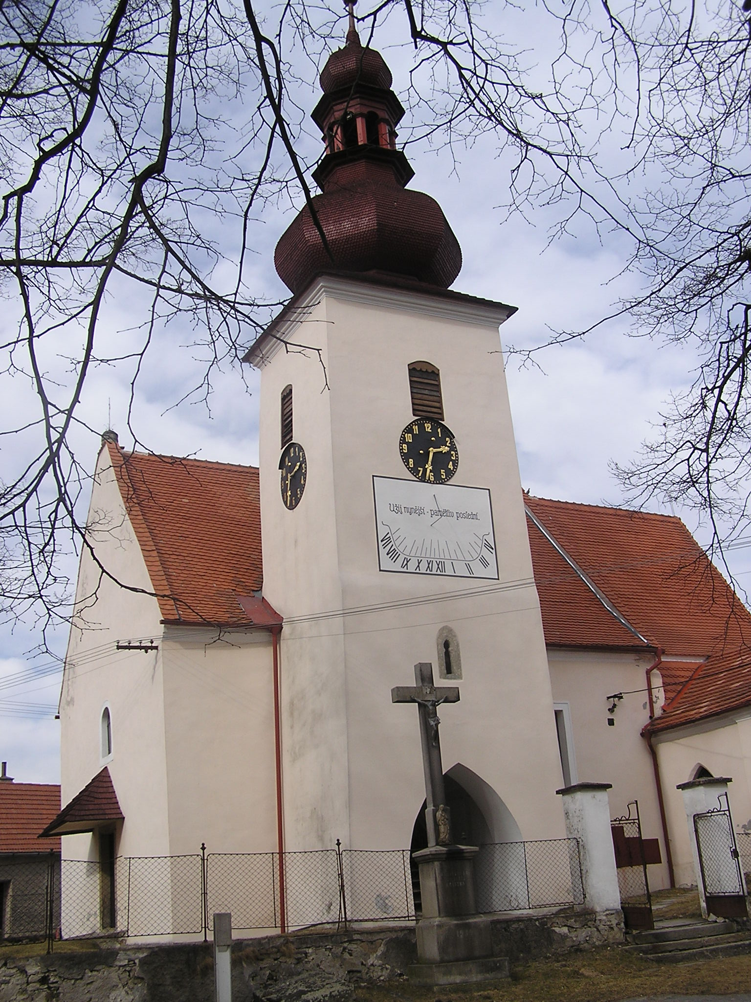 Kostel ve Střížově